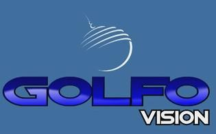 Logotipo del canal Golfovision